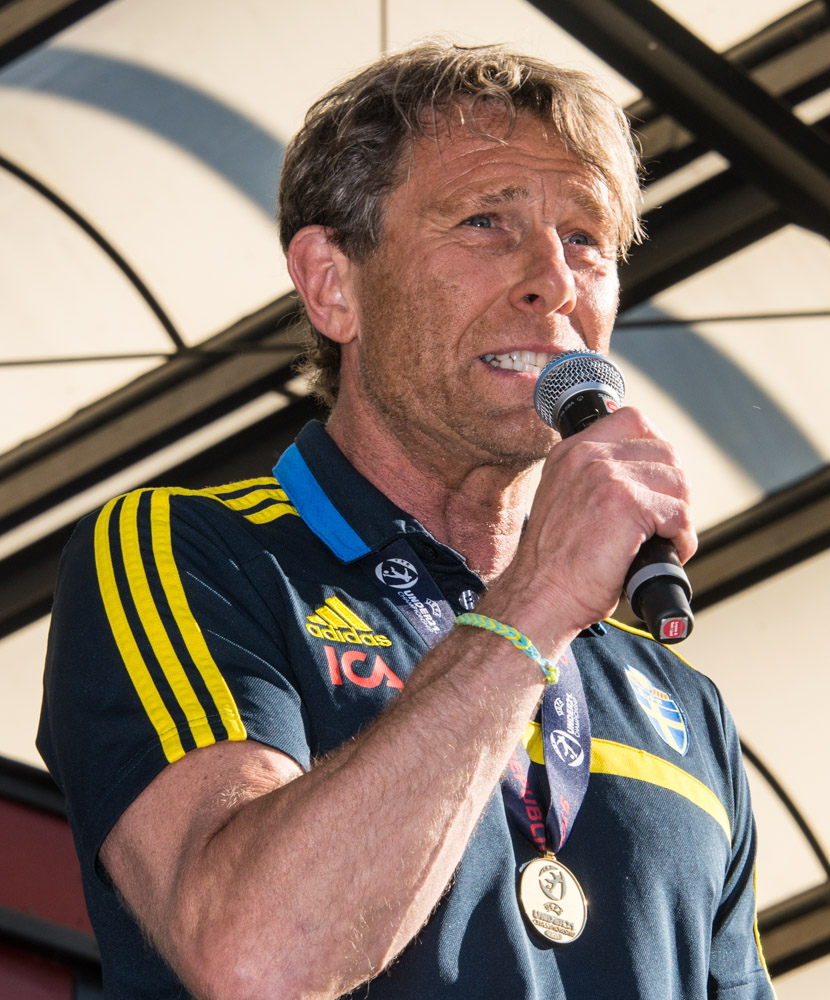 Håkan Ericson och U21-mästarna firas i Kungsträdgården i Stockholm den 1 juli 2015.